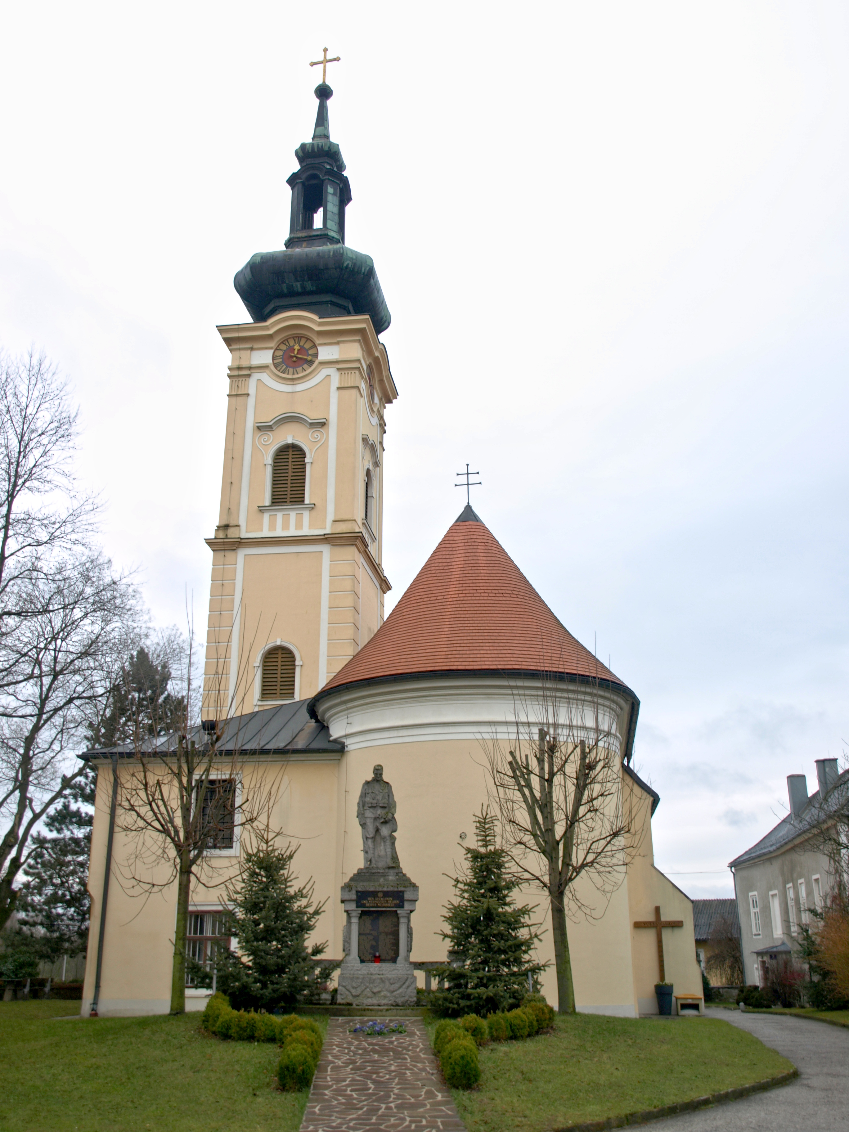 Kath. Pfarrkirche hl. Johannes der Täufer und ehem. Friedhof